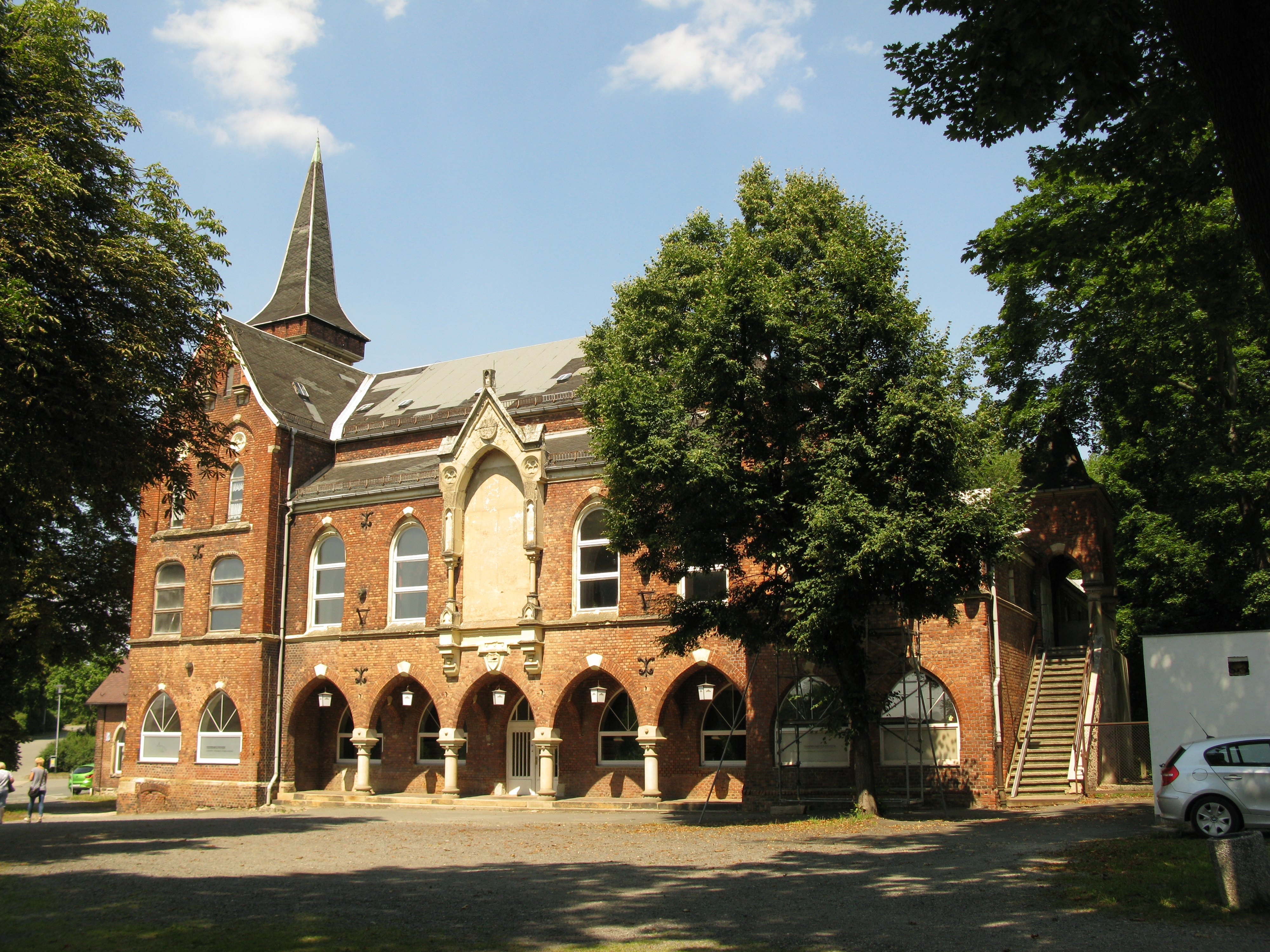 Plauen, denkmalgeschütztes Haus in der Äußeren Reichenbacher Straße (Äußere Reichenbacher Straße 2). Gasthaus "Treffer"